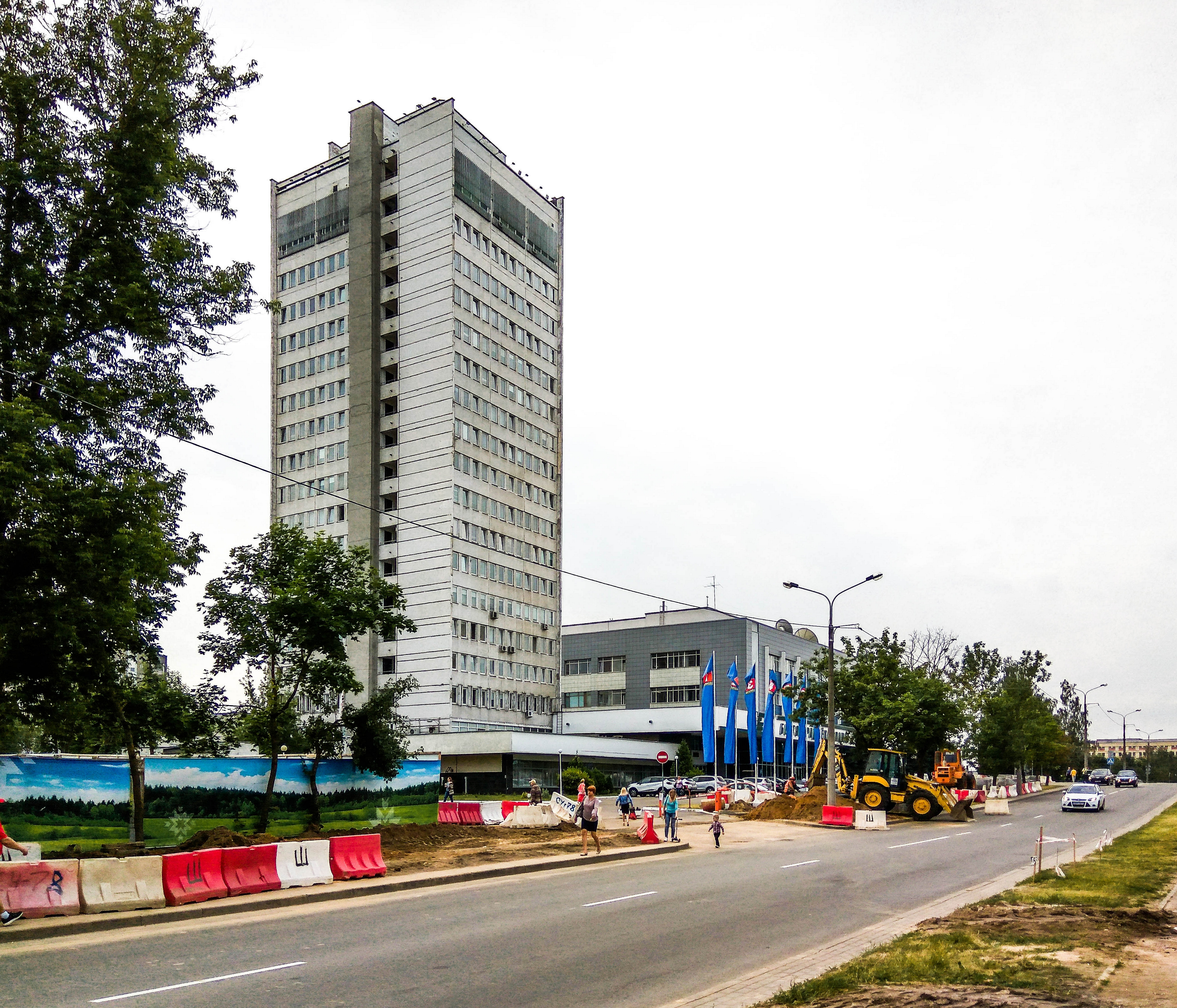 Мінск. Вуліца Макаёнка. Белтэлерадыёкампанія